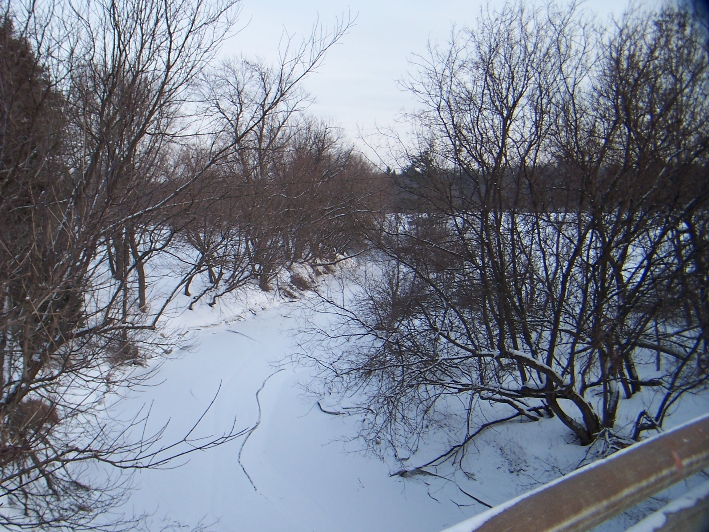 Entre chemin de la Mairie et A-40